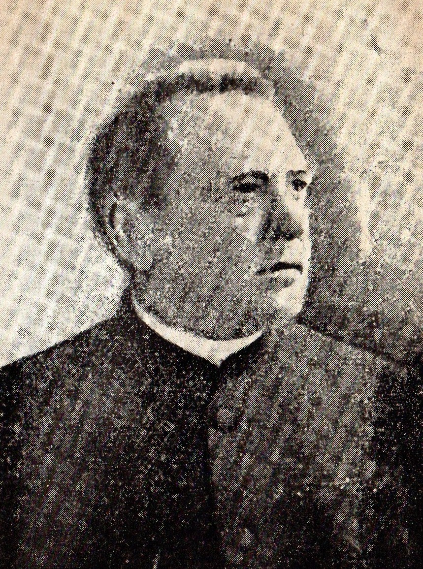 Walenty Barczewski - polski działacz narodowy, historyk, pisarz, folklorysta, redaktor i wydawca, proboszcz.